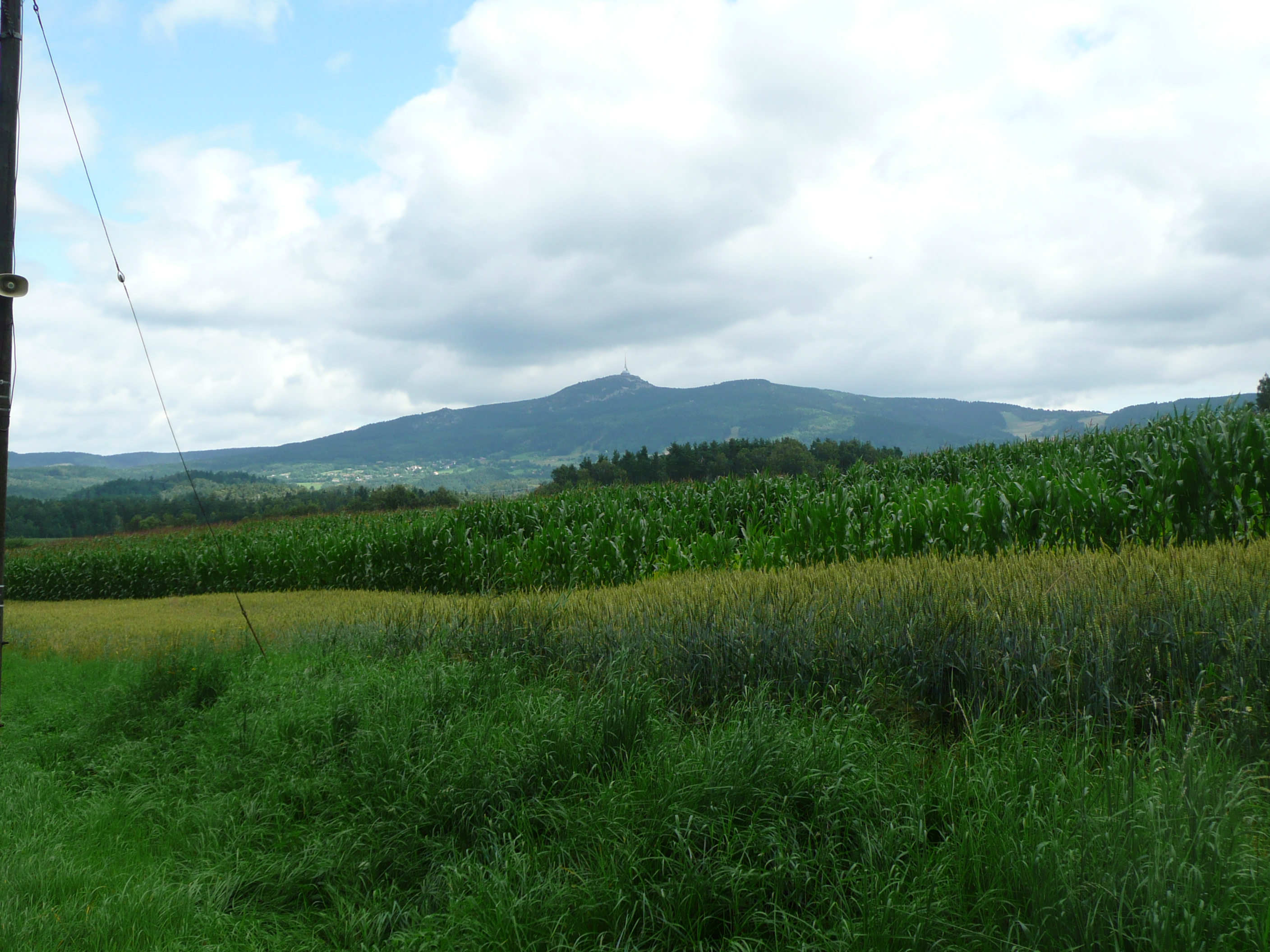 Blick auf den Ještěd von Osecna aus